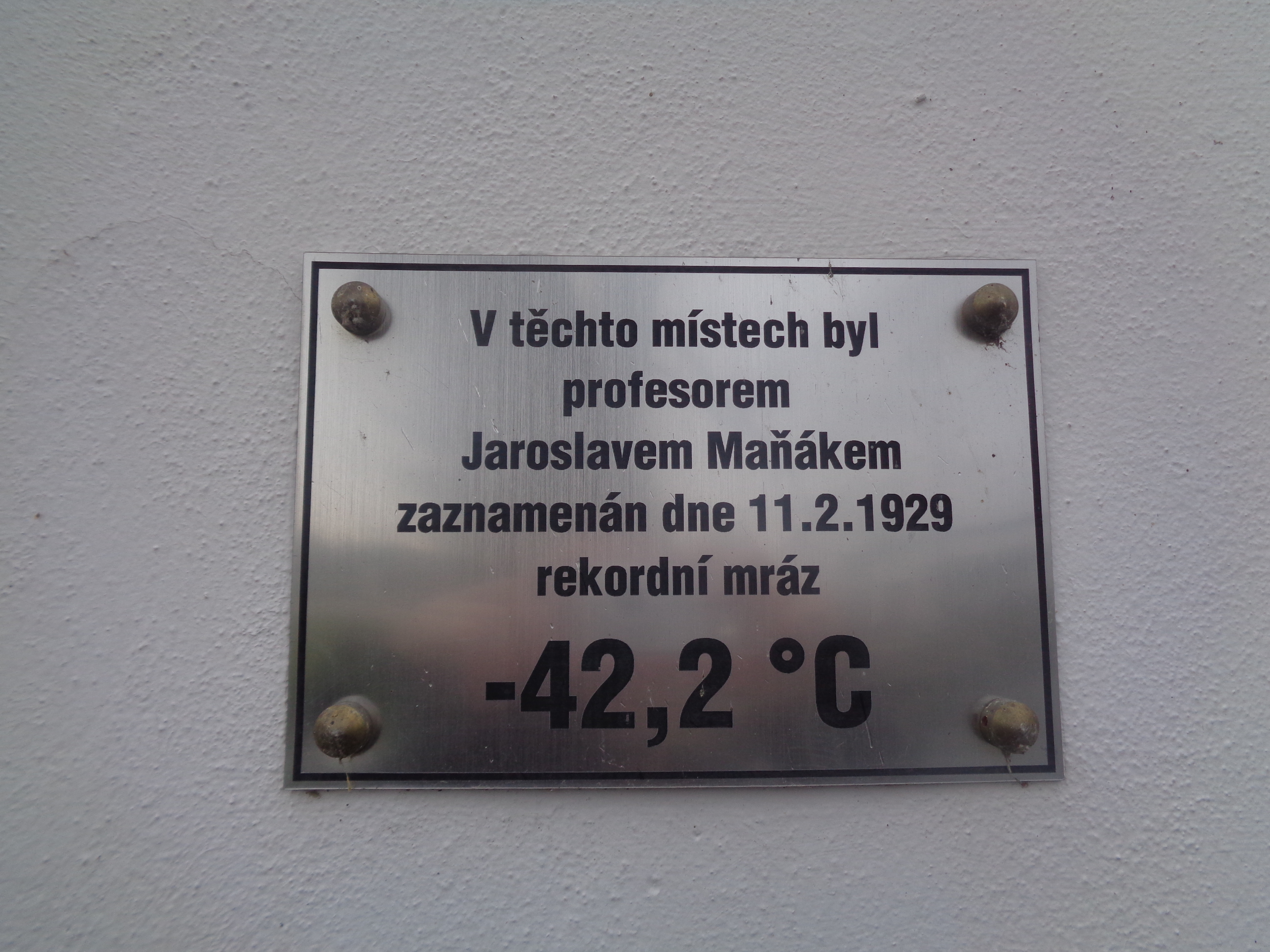 Stecherův mlýn u Litvínovic - místo naměření teplotního rekordu ČR v roce 1929